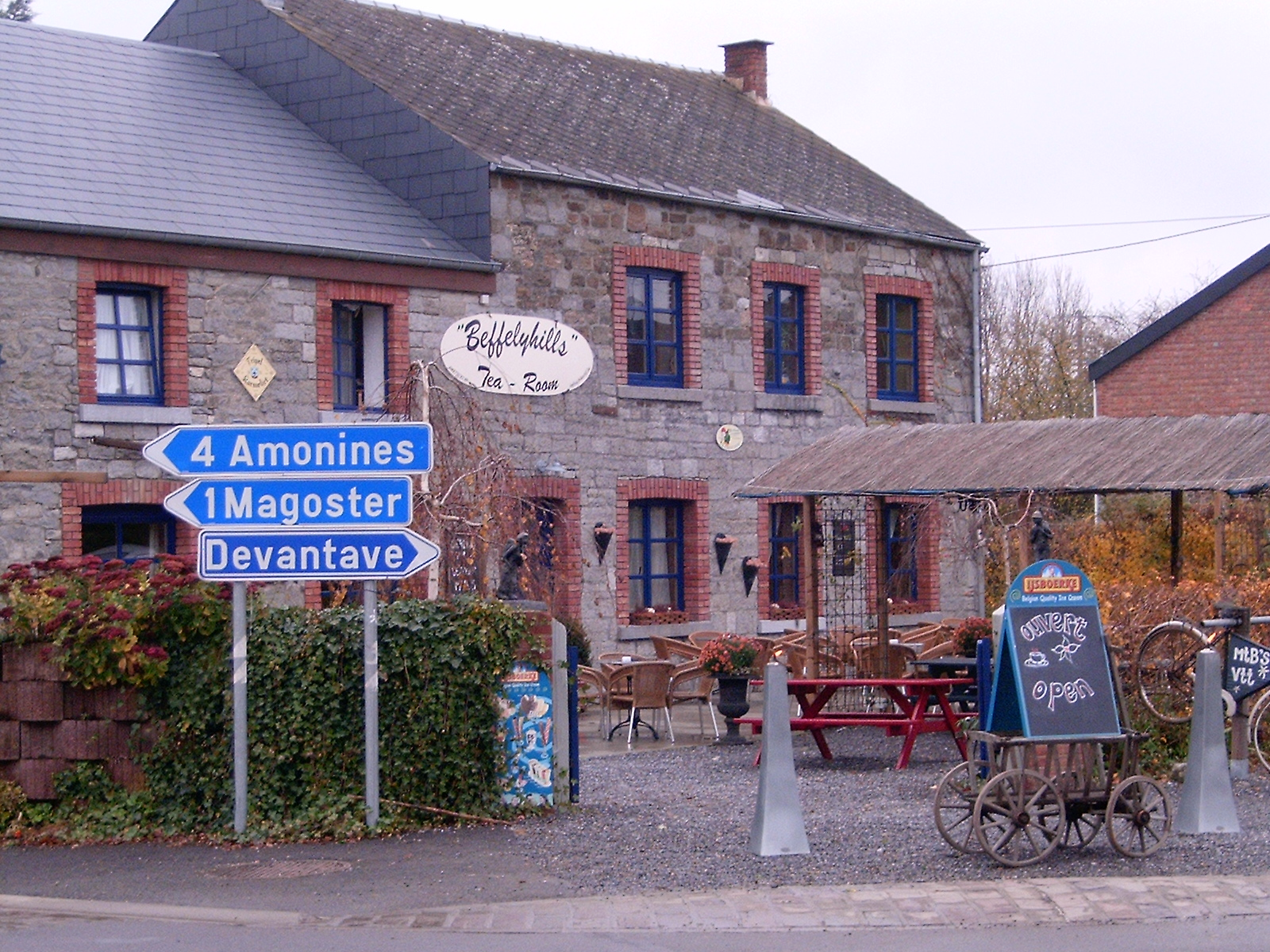 Beff